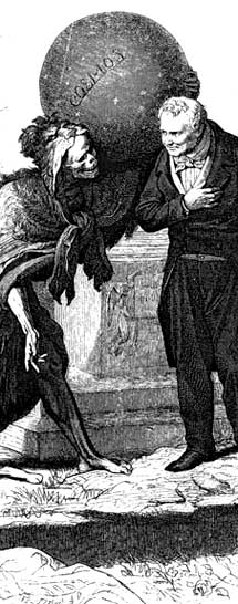 Farewell Cosmos (detail)